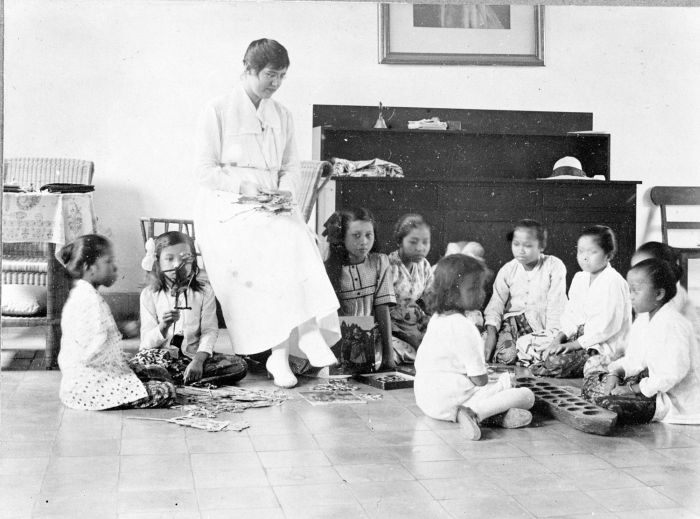 Foto. Nona Avelingh dan siswi-siswinya dengan materi pelajaran di kelas terendah "Kartinischool" (Sekolah Kartini) Bogor.